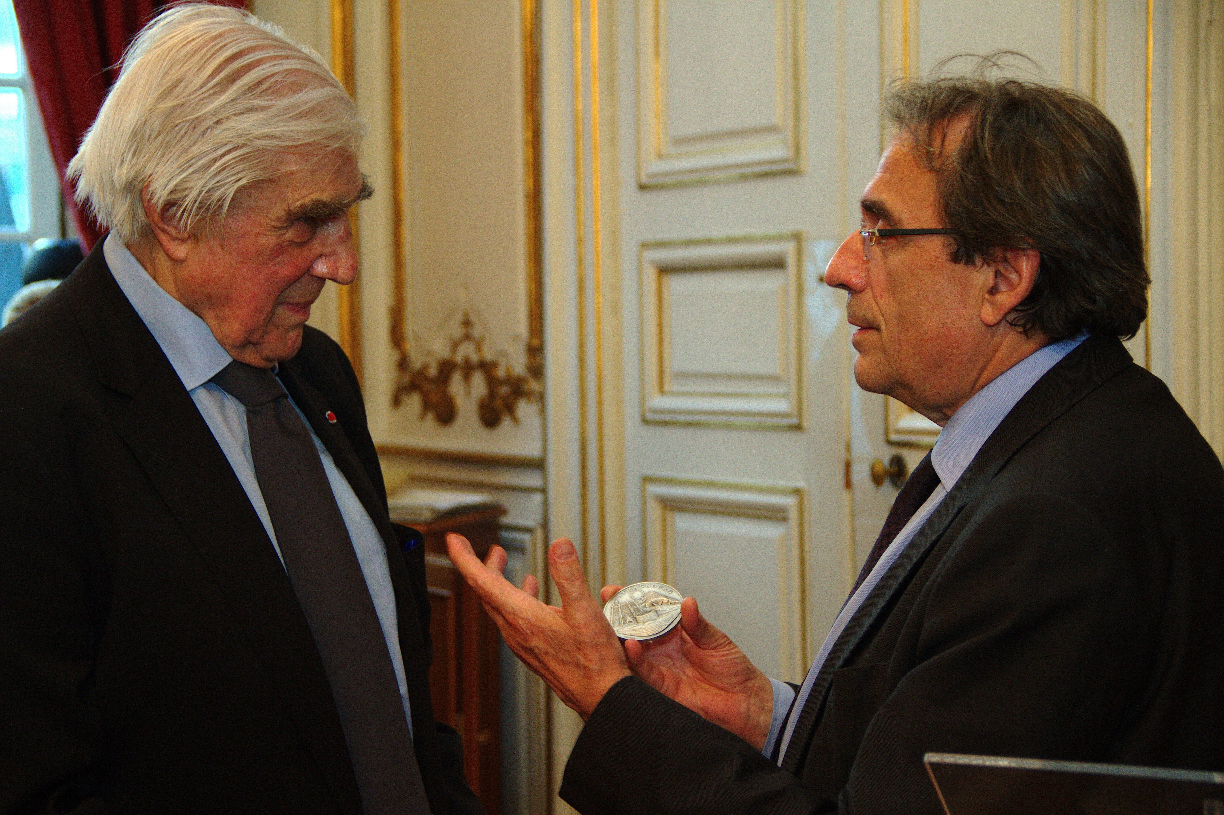 Jean Malaurie reçoit la médaille d'honneur de la ville de Strasbourg le 23 mai 2013